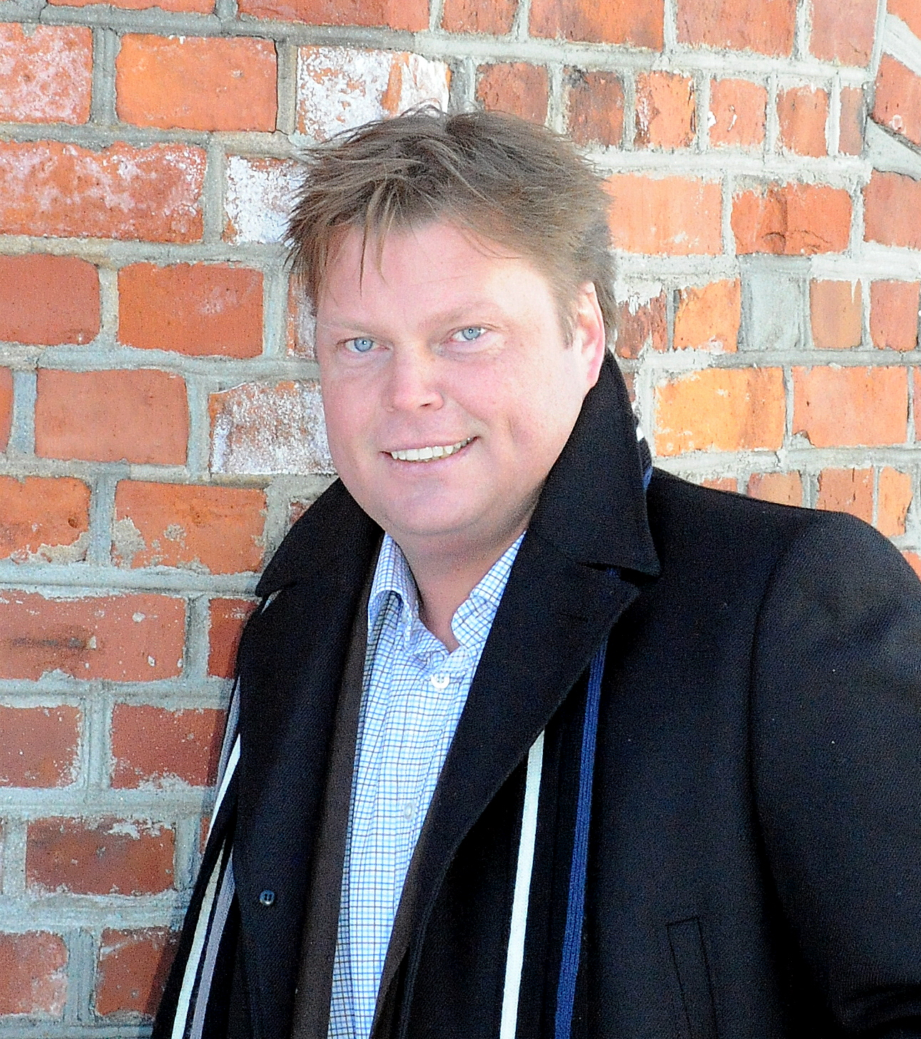 Photo: Myriam Bjerkli Jørn Lier Horst (født 27. februar 1970 i Bamble på Telemarkskysten), kriminalforfatter. Han er bosatt i Stavern og arbeider som etterforskningsleder ved politiet i Vestfold. Hans erfaring med miljøet og metodene han skriver om, gir romanene et realistisk og autentisk preg.